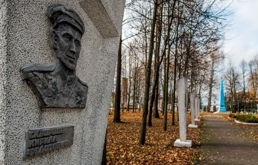 г. Велиж. Памятник Скворцову